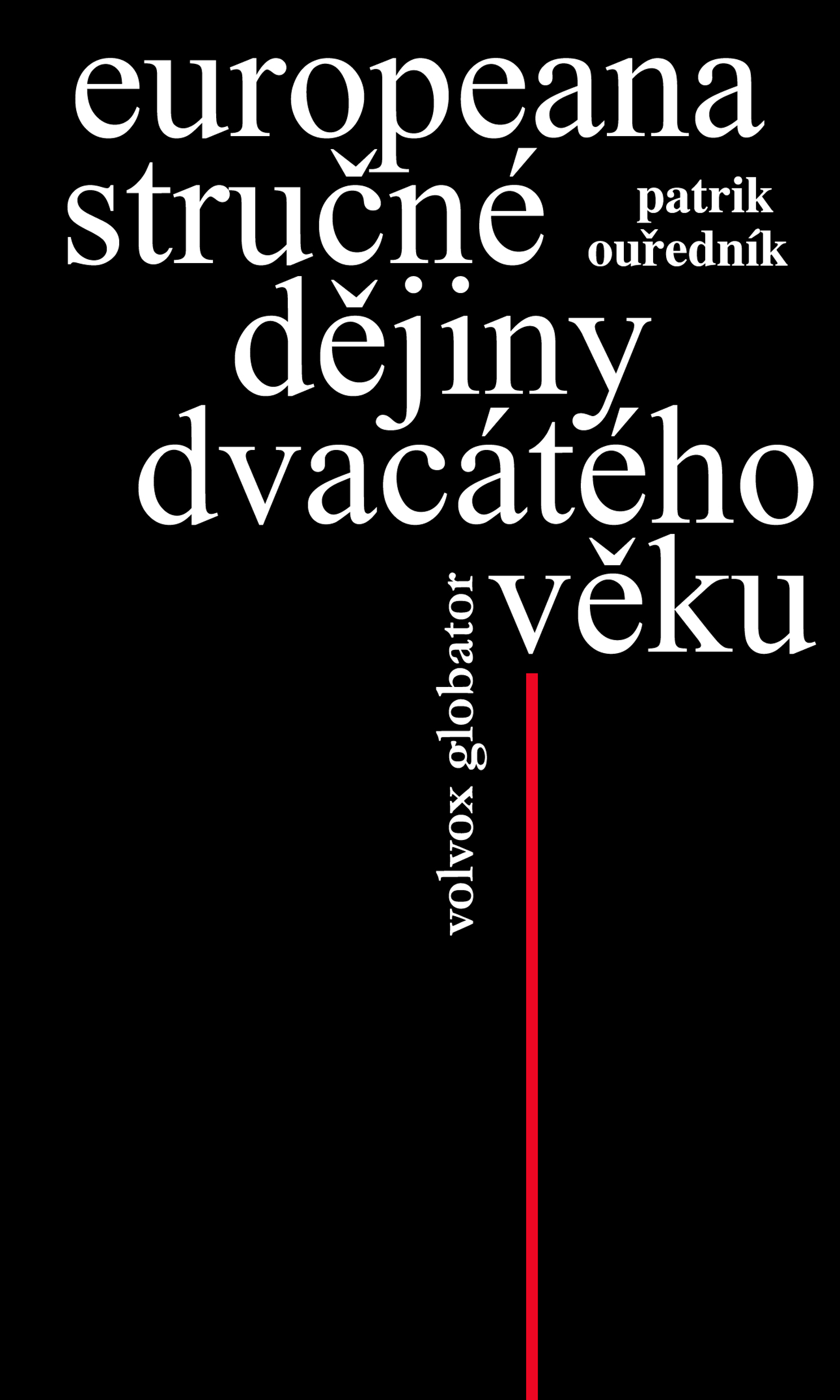 Obálka 4. vydání, Volvox Globator, 2012. Autor: Patrik Ouředník pod pseudonymem Petr Sedlecký